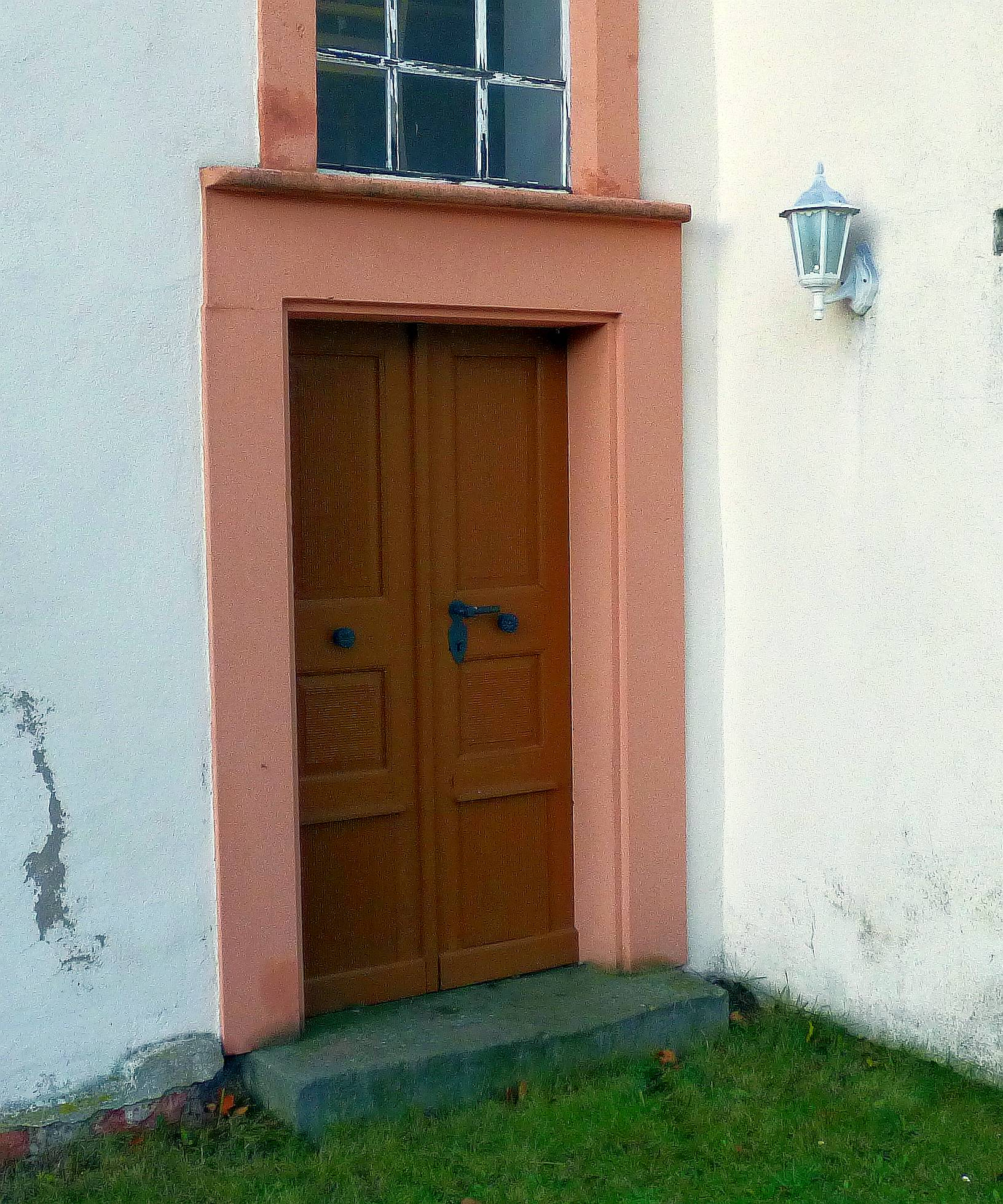 Pforte Südseite der Dorfkirche Fichtenberg (Mühlberg/Elbe)